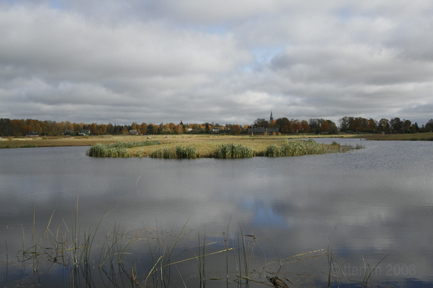 Nõo paisjärv ehk Nõo veskijärv. Pais on rajatud Nõo ojale.